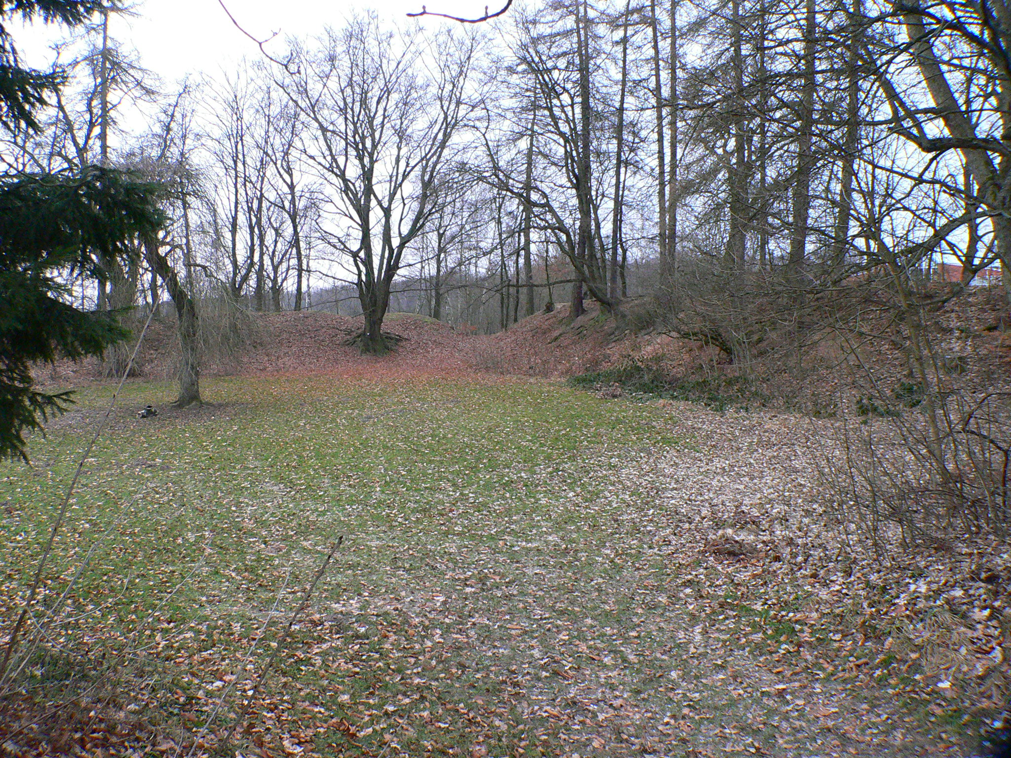 Ehemalige Burg Sensenstein: nord-westlicher Teil des Burgareals mit erhaltenem Wall